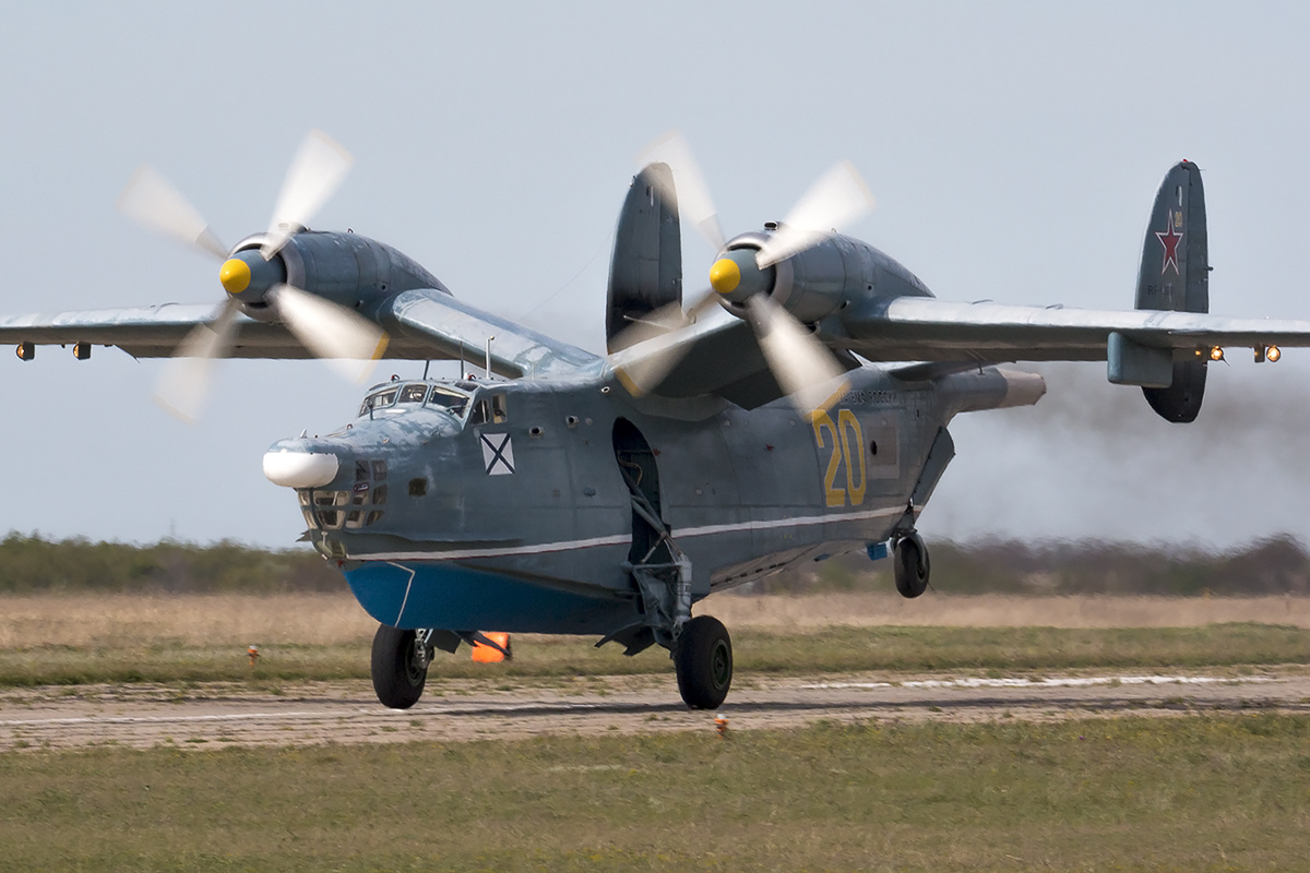 Beriev Be-12PS "Chayka"